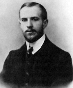 Foto von Fjodor Pawlowitsch Rjabuschinski (1885-1910)